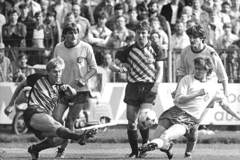 ADN-ZB-Kluge -11.4.87-mb-Leipzig: Fußball-Oberliga- 1. FC Lok Leipzig gegen BFC Dynamo 1:3 (0:1)- Mit diesem Schuß verfehlt Rainer Ernst (l.) noch das Ziel, beim nächsten Angriff erzielte er das Führungstor für die Berliner. Weiter v.l.: Hans Richter (Leipzig), Andreas Thom (BFC), Frank Edmond und Ronald Kreer (beide Leipzig).